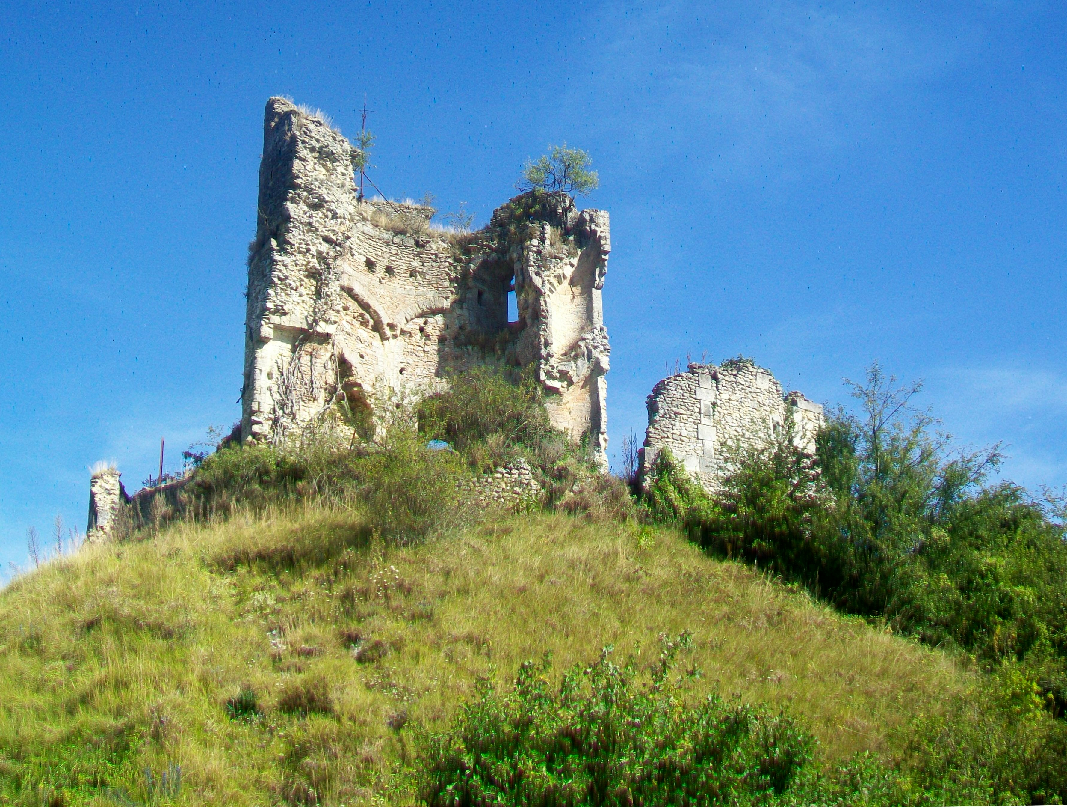 Le donjon, vue depuis le sud-est.